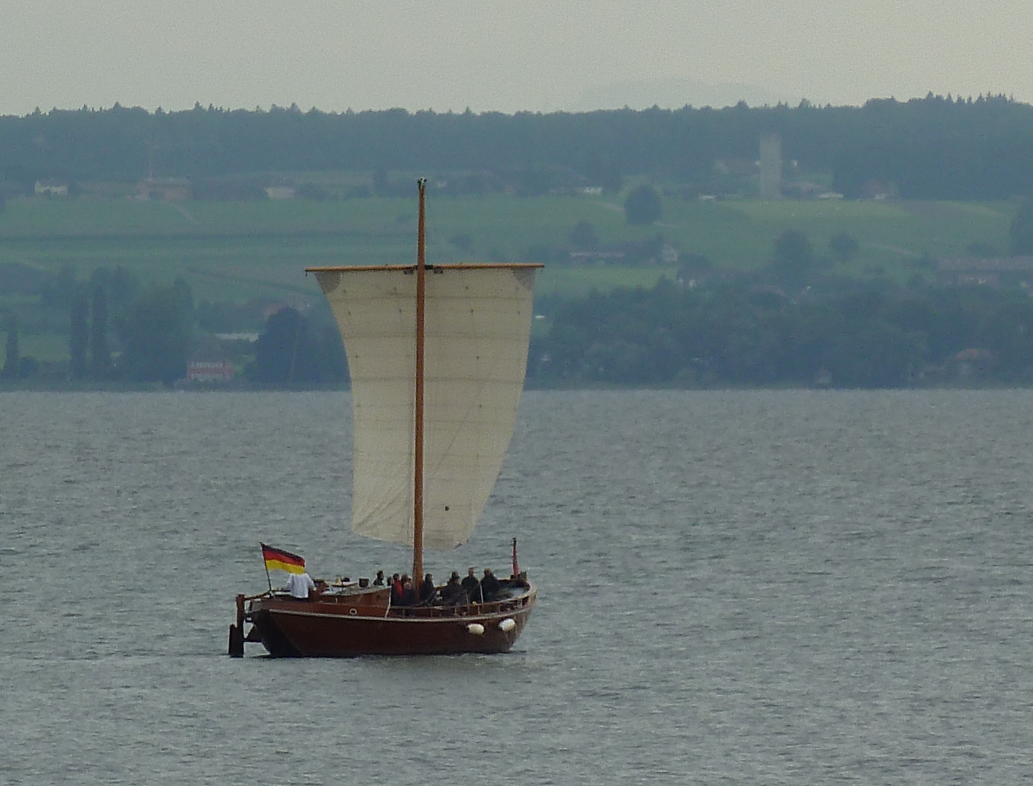 Die St. Jodok ist der Nachbau (1999) der Lastensegler, die bis zum Beginn des 20. Jahrhunderts auf dem Bodensee in Gebrauch waren. Sie wird für Rundfahrten vom Heimathafen Immenstaad aus eingesetzt.